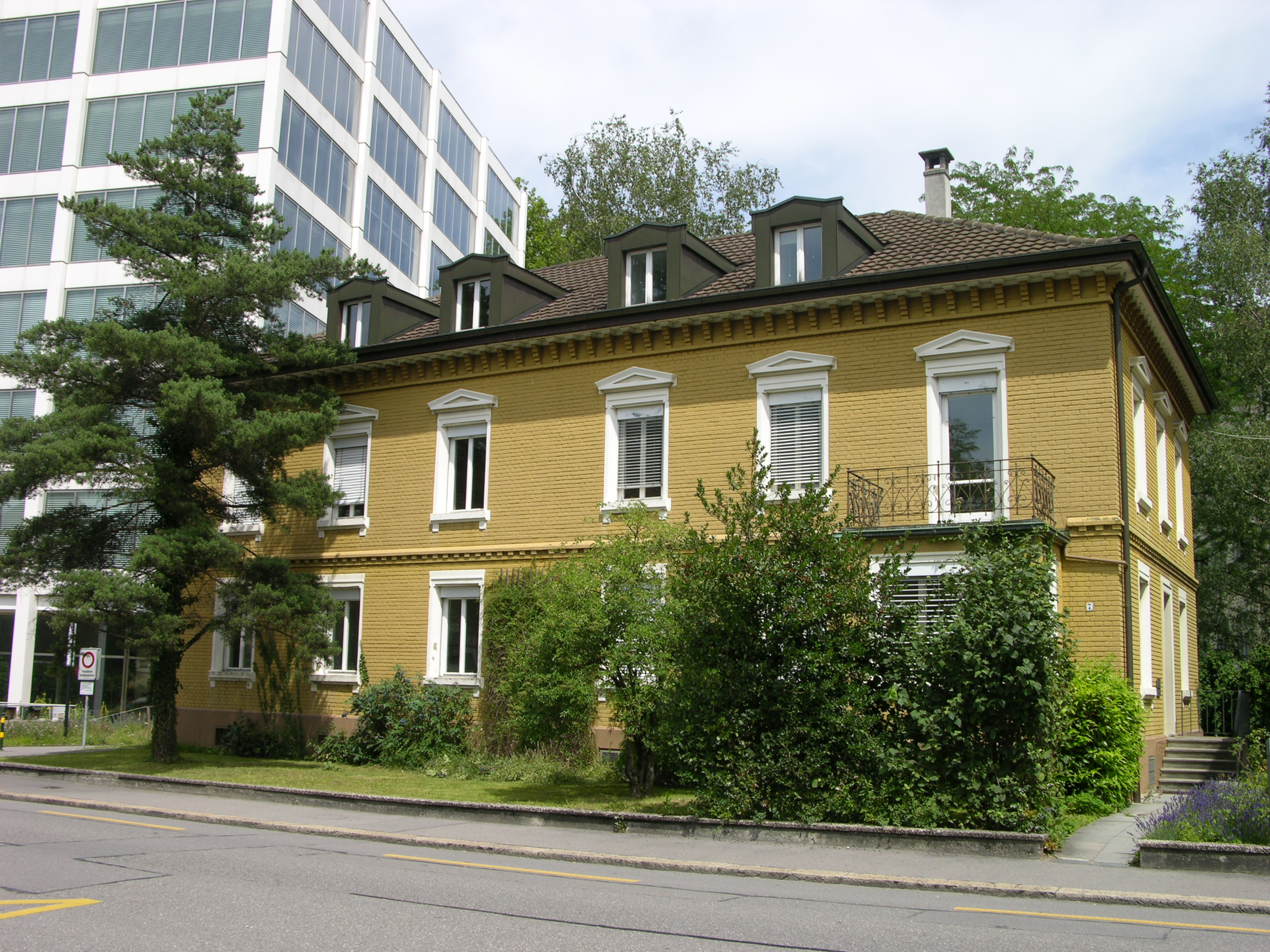 János-Tamás-Haus der Alten Kantonsschule Aarau an der Feerstrasse (Im Hintergrund: das Paul-Karrer-Haus)